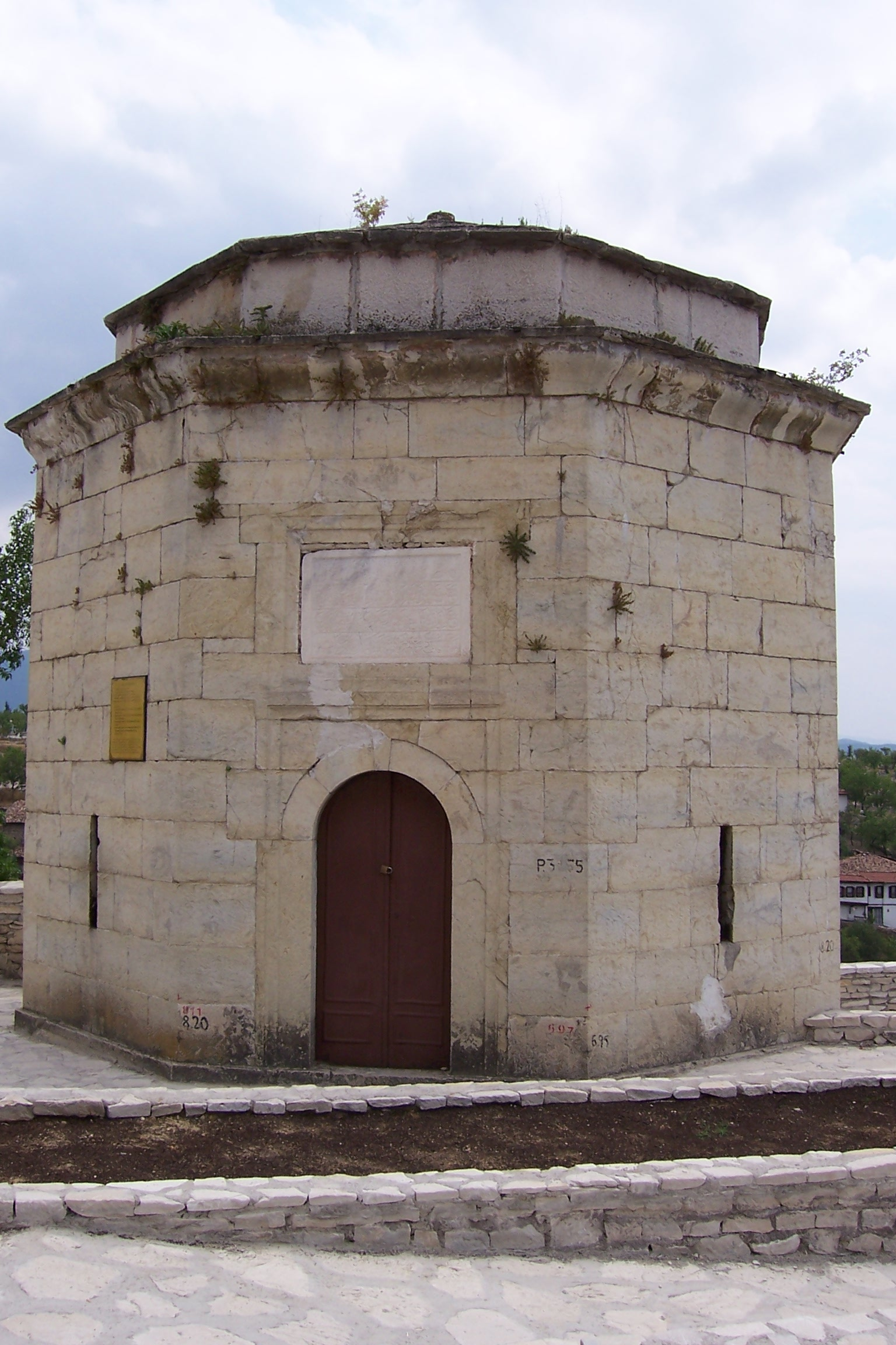 Hıdırlık, Safranbolu, Karabük, Turkey